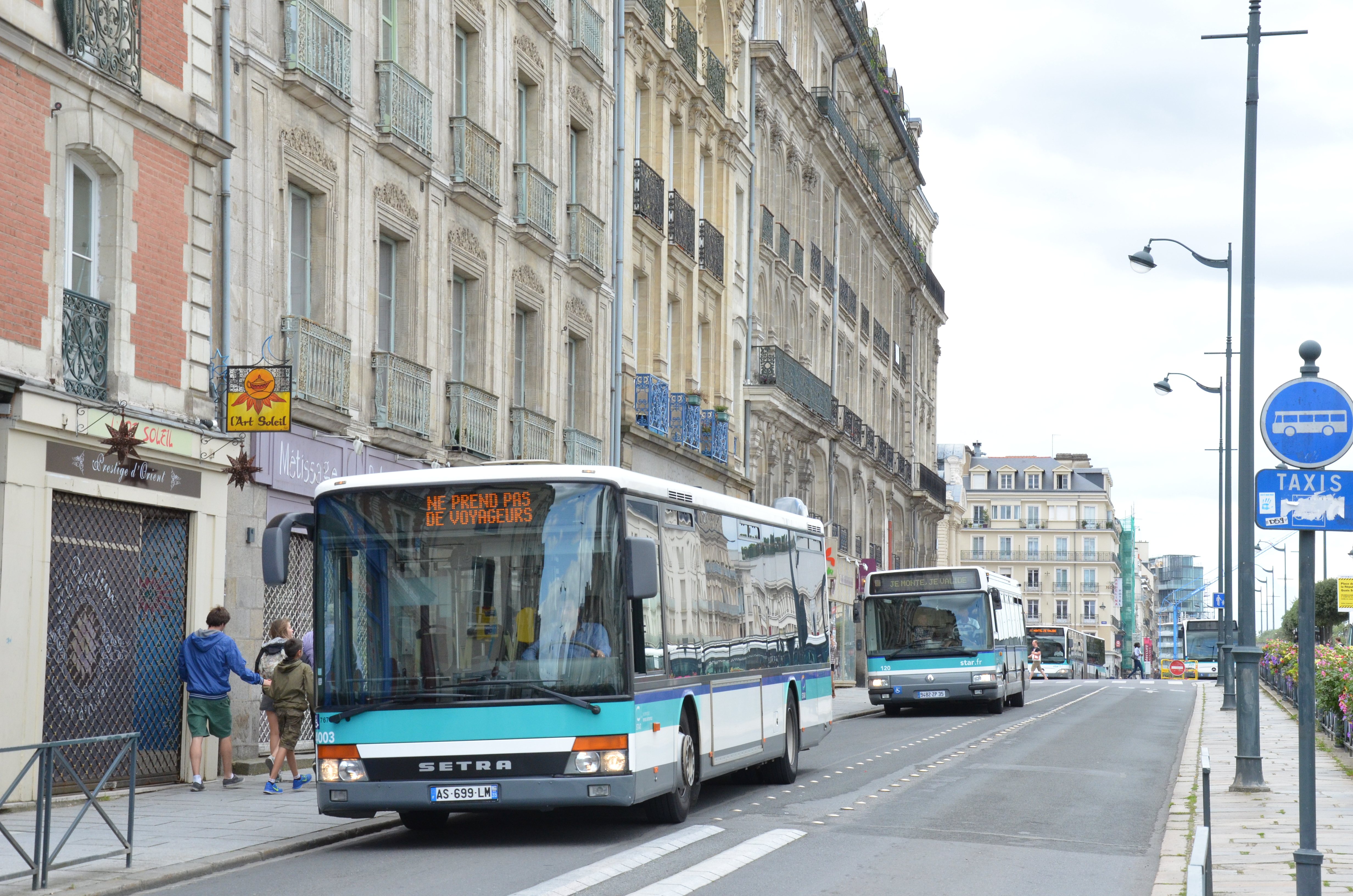 Setra S315 NF n°4003 et Renault Agora S n°120 du réseau STAR, près du Musée des Beaux-Arts de Rennes.